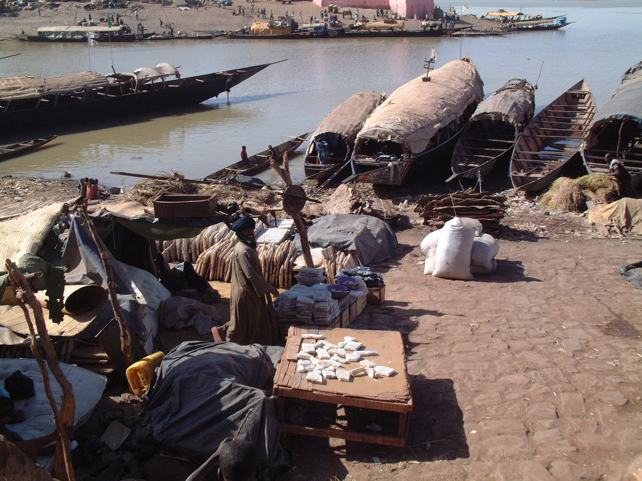 Mopti, Pinasses au bord du Banni.